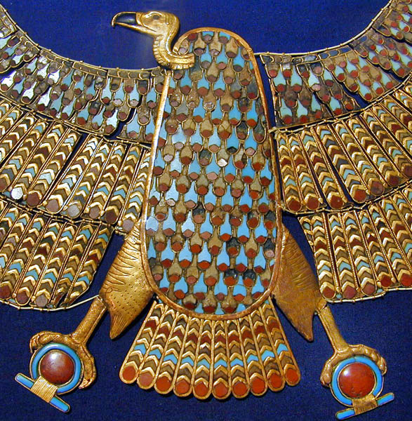 Elément central d'un gorgerin représentant la déesse-vautour Nekhabit Dans le seul cercueil d'or de Toutânkhamon, 143 bijoux enfouis dans les bandelettes du linceul recouvraient la momie de Toutankhamon : gorgerins en or plat, pectoraux, pendentifs, bracelets, bagues, etc. Beaucoup d'autres bijoux se trouvaient dans le mobilier funéraire notamment dans la chambre du trésor. La plupart des bijoux du trésor sont réalisés en or cloisonné, incrusté de cornaline et de pâtes de verre rouges, bleu clair et bleu sombre. La tombe de Toutankhamon (1340-1331 AV. J.C.# a été découverte par Howard Carter en novembre 1922. Le pharaon est mort à 19 ans, sa momie se trouvait dans un cercueil en or massif, placé à l'intérieur de 2 cercueils en bois# Ces 3 cercueils étaient dans un sarcophage de quartzite à couvercle de granit rouge# Autour du sarcophage, s'emboîtaient les unes dans les autres, 4 chapelles en bois doré qui occupaient entièrement la salle du sarcophage#